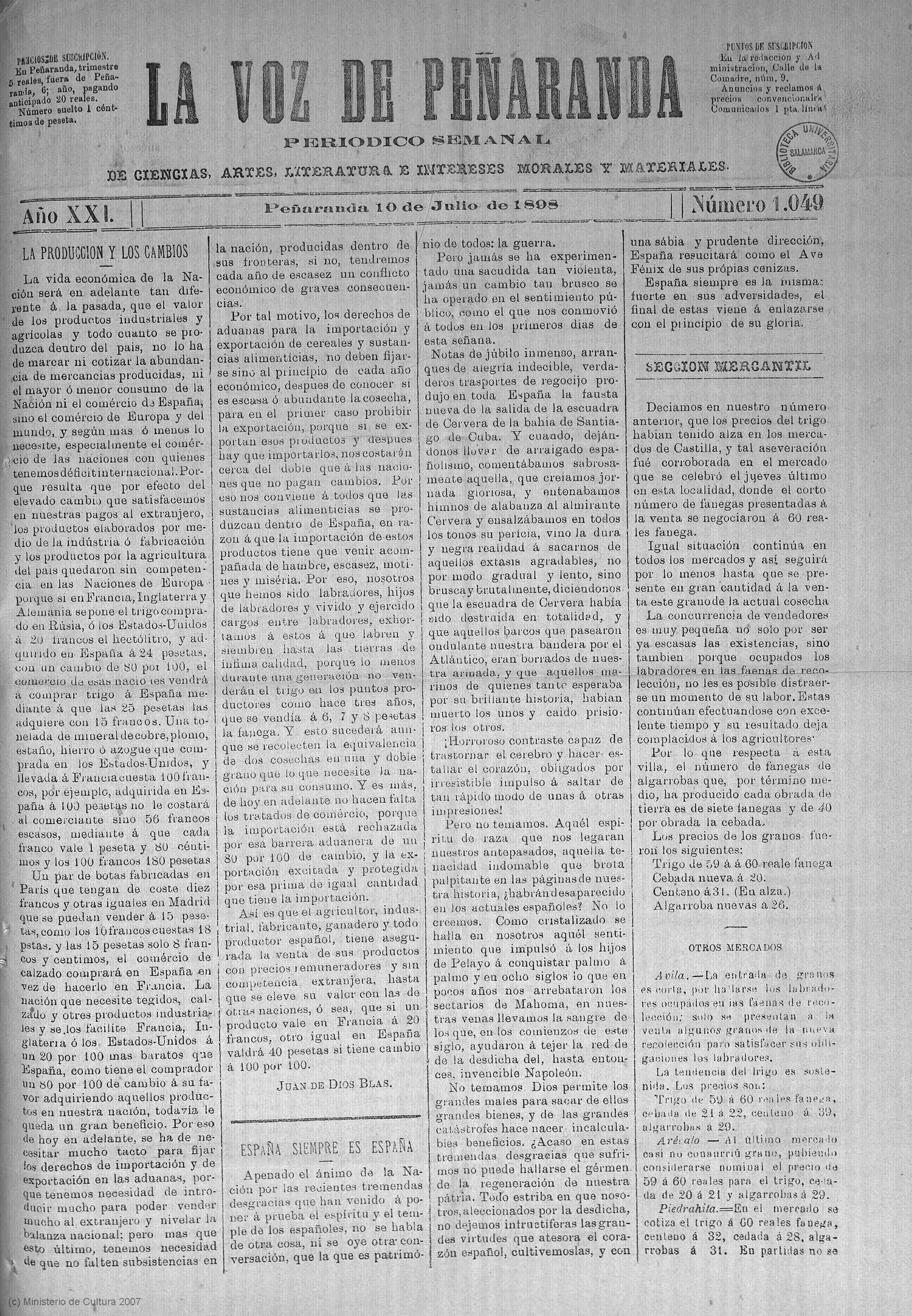 Ejemplar núm. 1048 del semanal "La Voz de Peñaranda" de 10 de julio de 1898, primer ejemplar emitido tras la derrota del ejército español en la Batalla de la Bahía de Cuba que confirmaba la derrota en la Guerra de Cuba. Resulta a estos efectos muy interesante el artículo en portada de "España siempre es España" en referencia a dicho suceso que trastornará a todo el país.